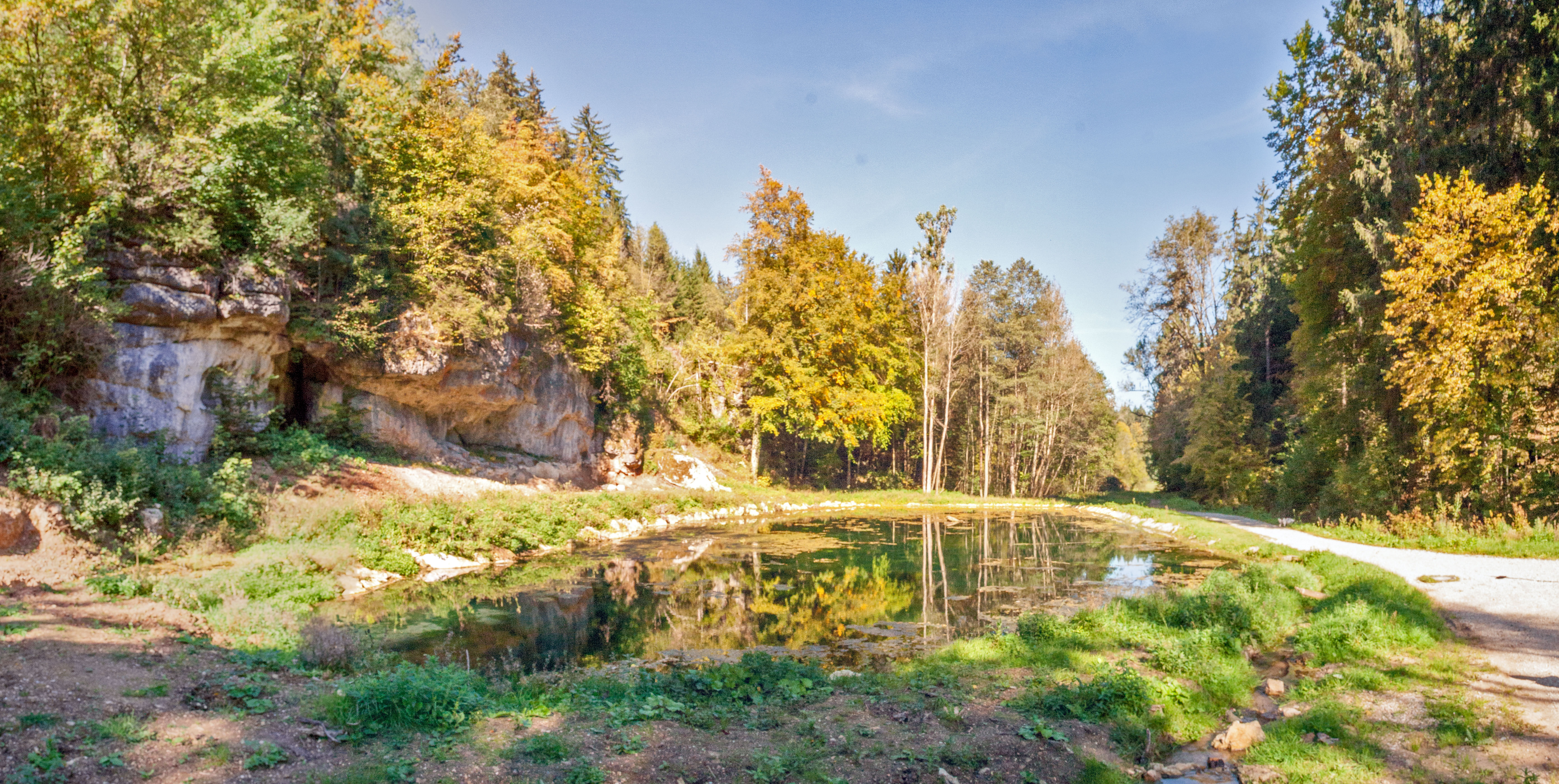 Klumpertal, Pottenstein, LSG "Fränkische Schweiz - Veldensteiner Forst"